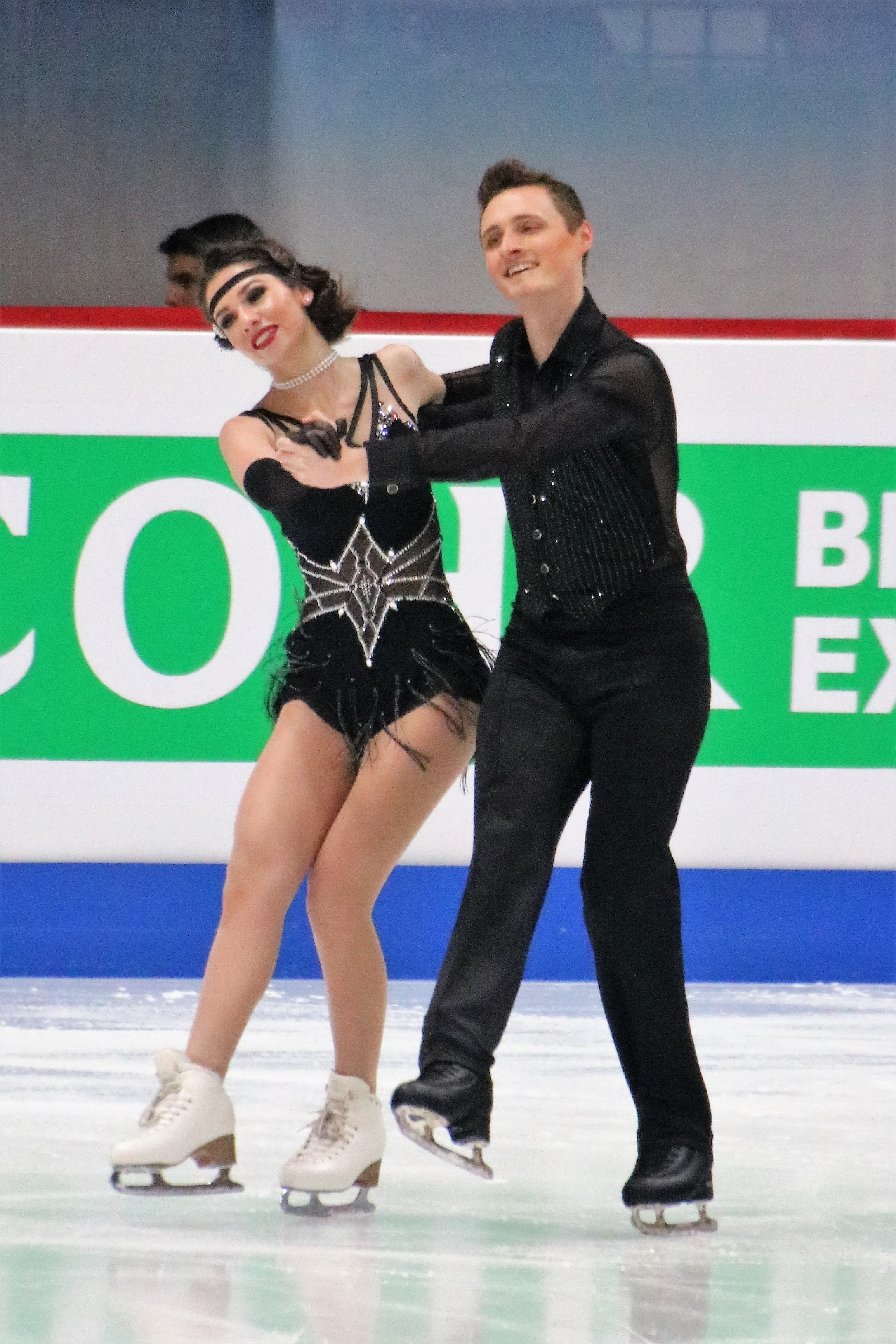 Мина Здравкова и Кристофер М. Девис (Болгария) на чемпионате Европы по фигурному катанию 2020